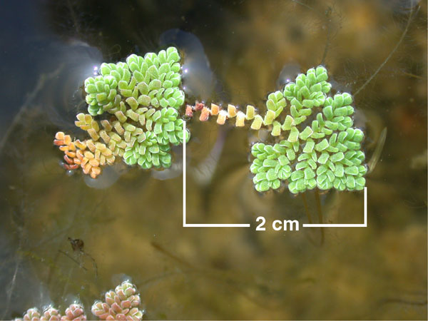 Azolla pinnata à Antananarivo